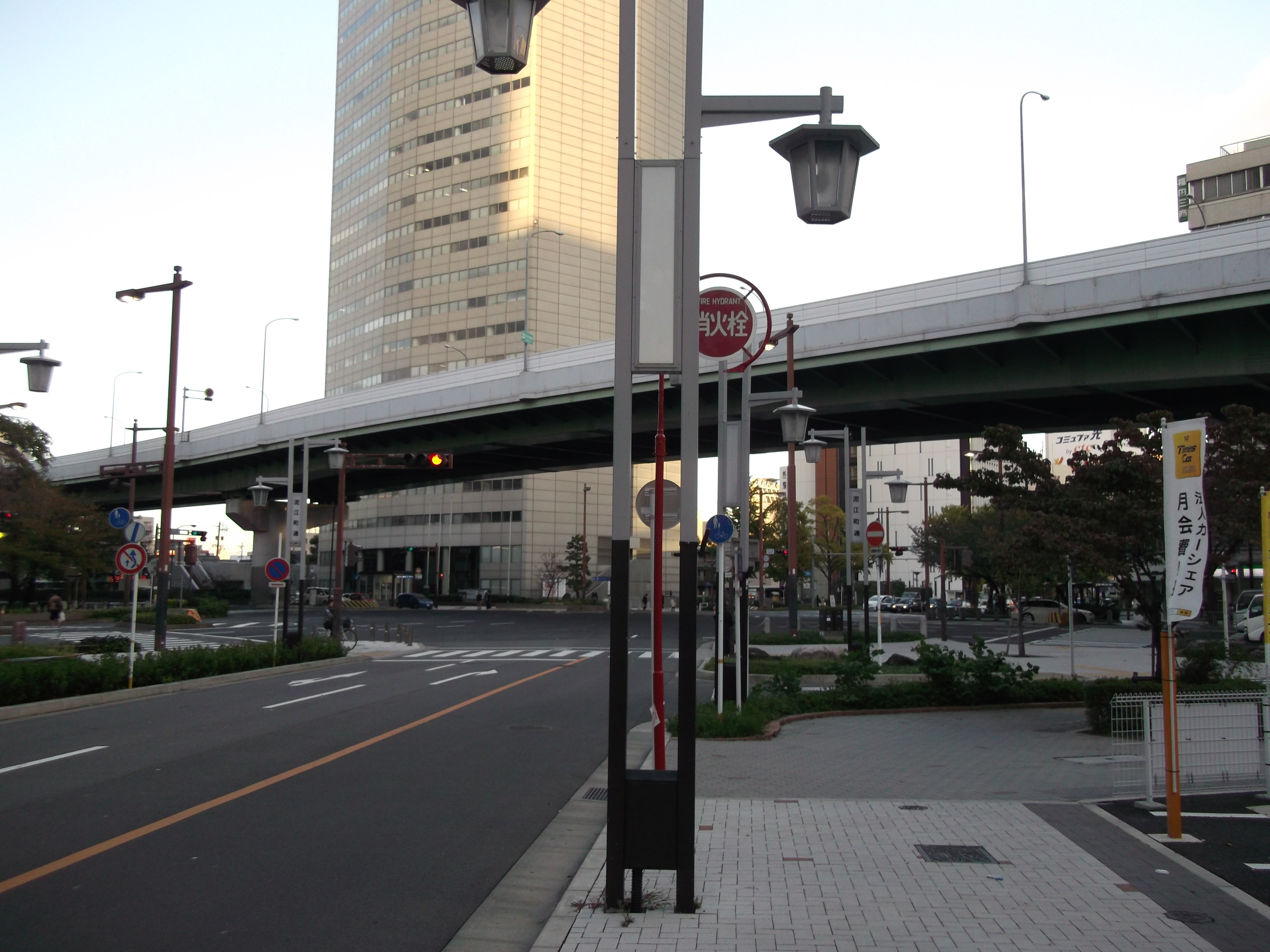 名古屋市中村区の泥江町交差点を南西側から撮影